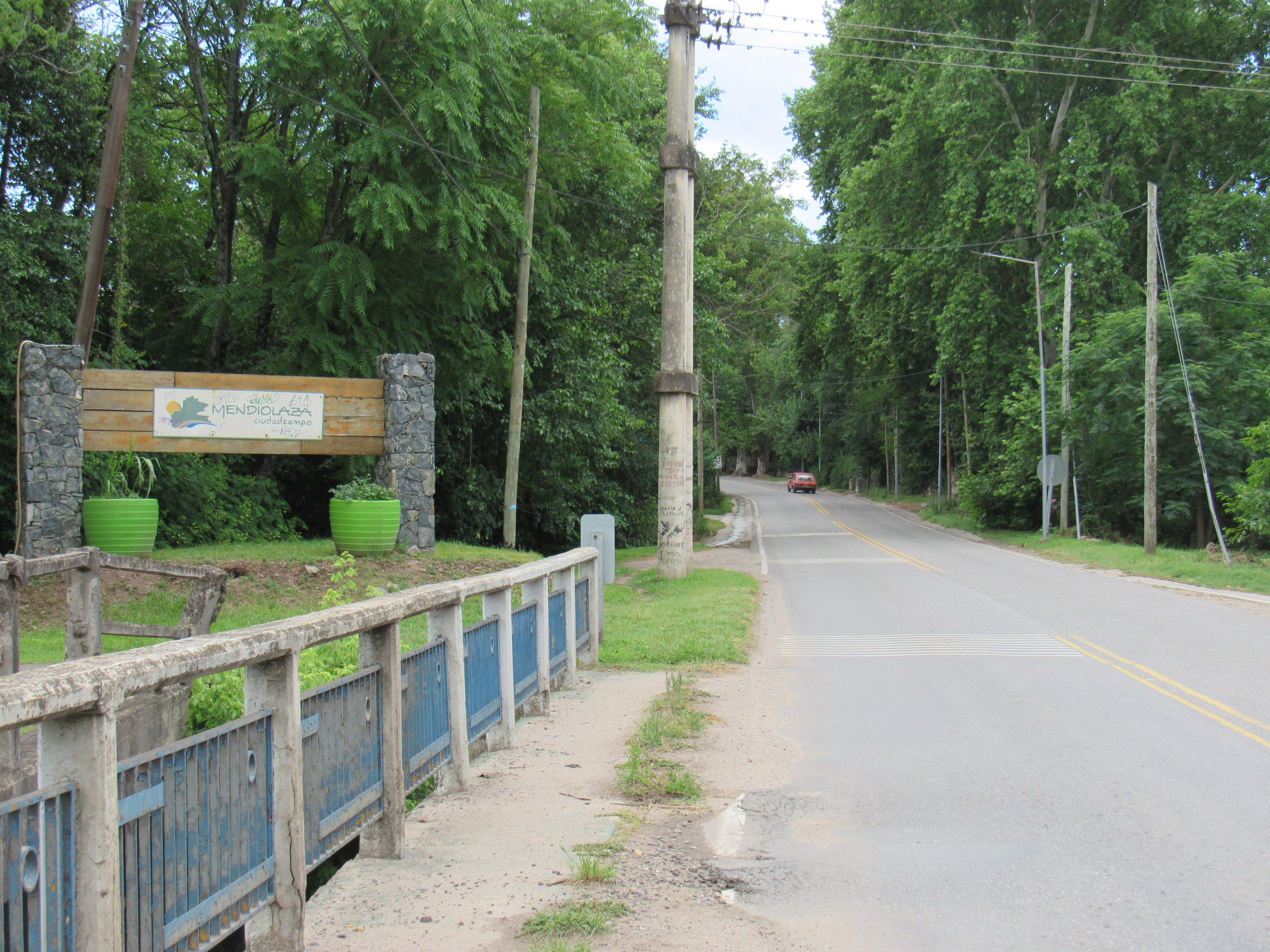 Acceso Mendiolaza, Córdoba, Argentina